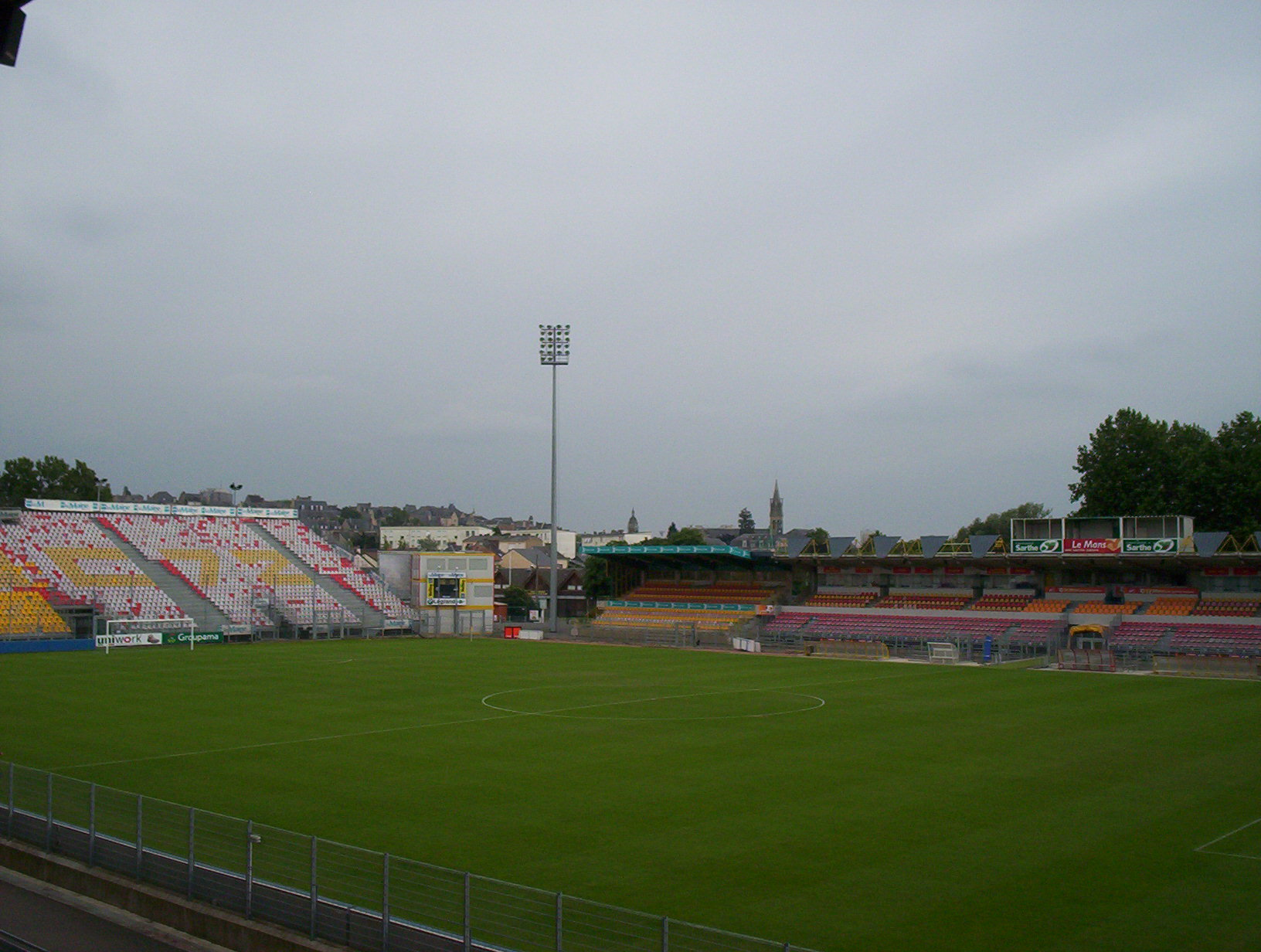 Photo du stade Léon Bollée du Mans